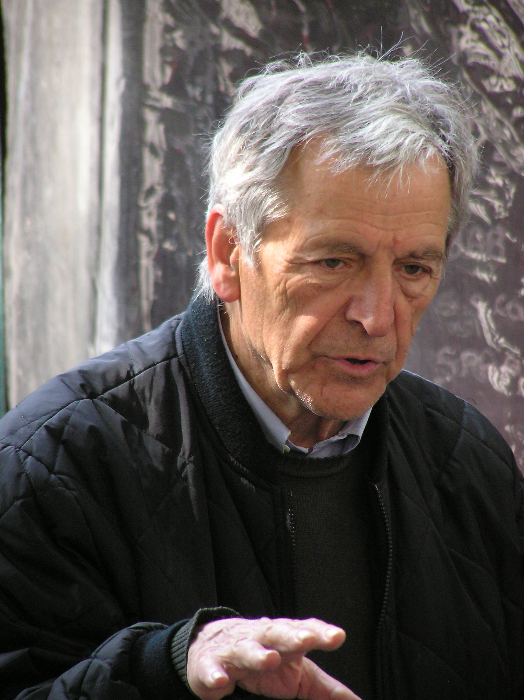 Costa-Gavras, au cours du tournage, à Paris, du film Eden à l'Ouest, le 22 avril 2008